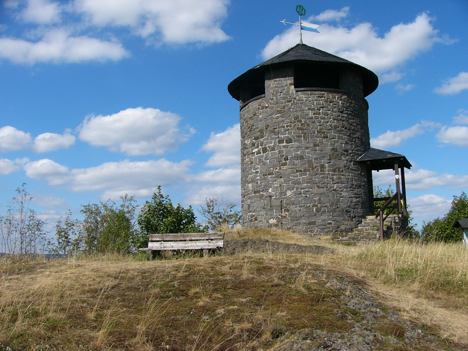 Ansicht von Frankenwarte und Umgebung